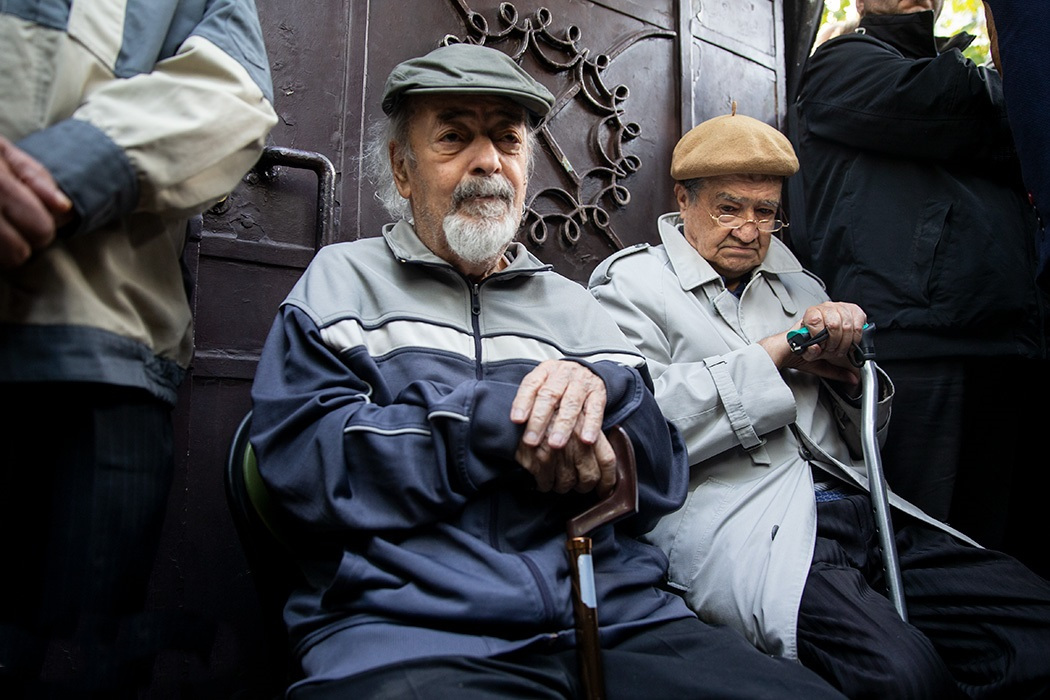 محمد ملکی در مراسم تشییع پیکر اعظم طالقانی، صبح ۱۰ آبان ۱۳۹۸، موسسه اسلامی زنان (واقع در خیابان برادران قائدی)